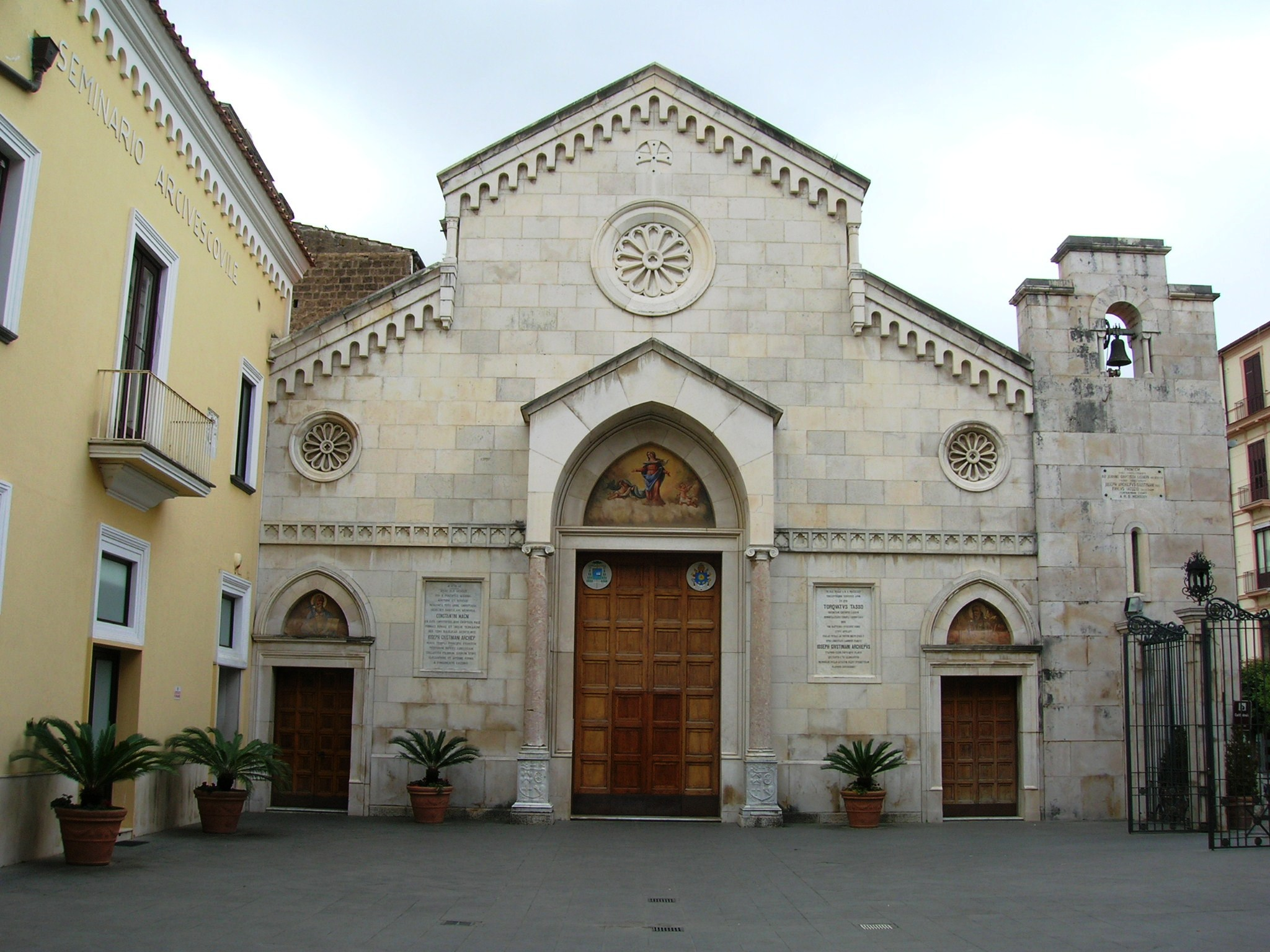 La cattedrale dei Santi Filippo e Giacomo a Sorrento